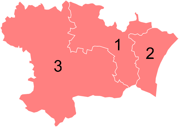 Résultats des élections législatives de l'Aude en 2012